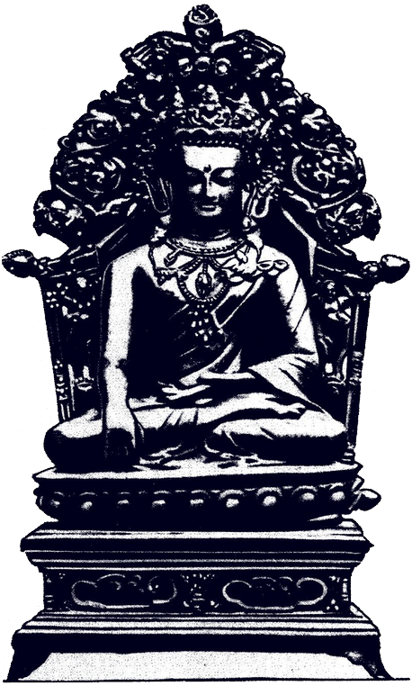 Большой Чжу — главная святыня Тибета